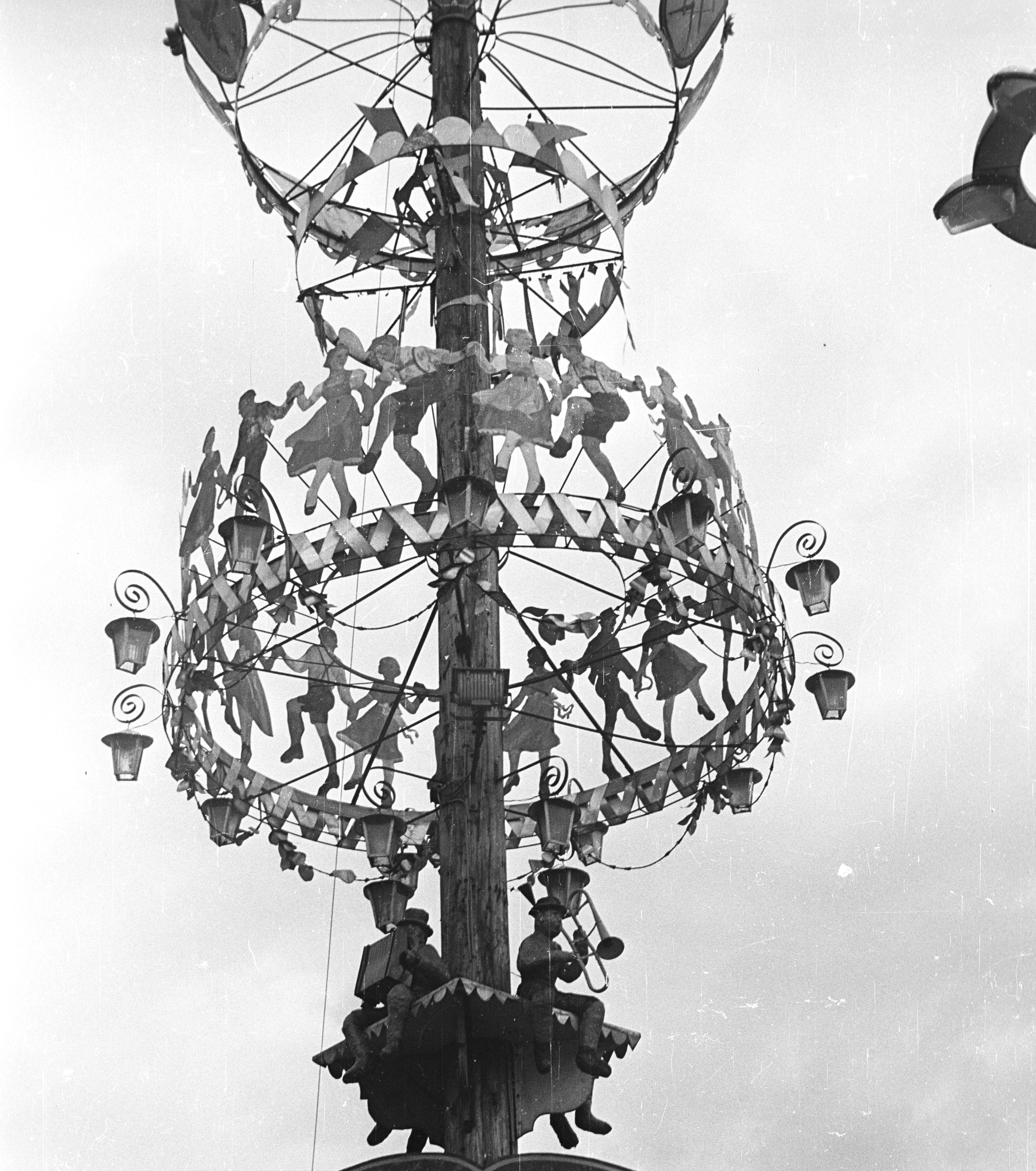 Hauptstrasse. Location: Austria Title: Hauptstrasse.